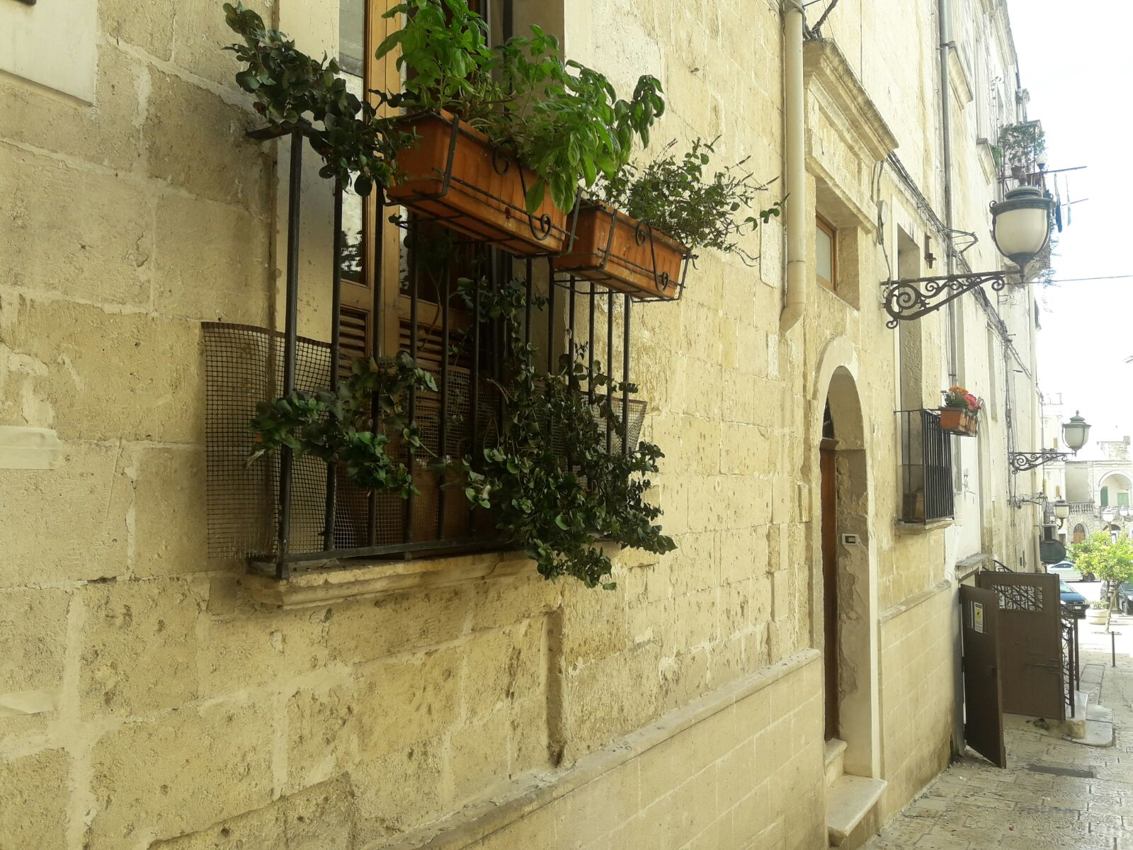 Particolare della facciata di una abitazione del centro storico